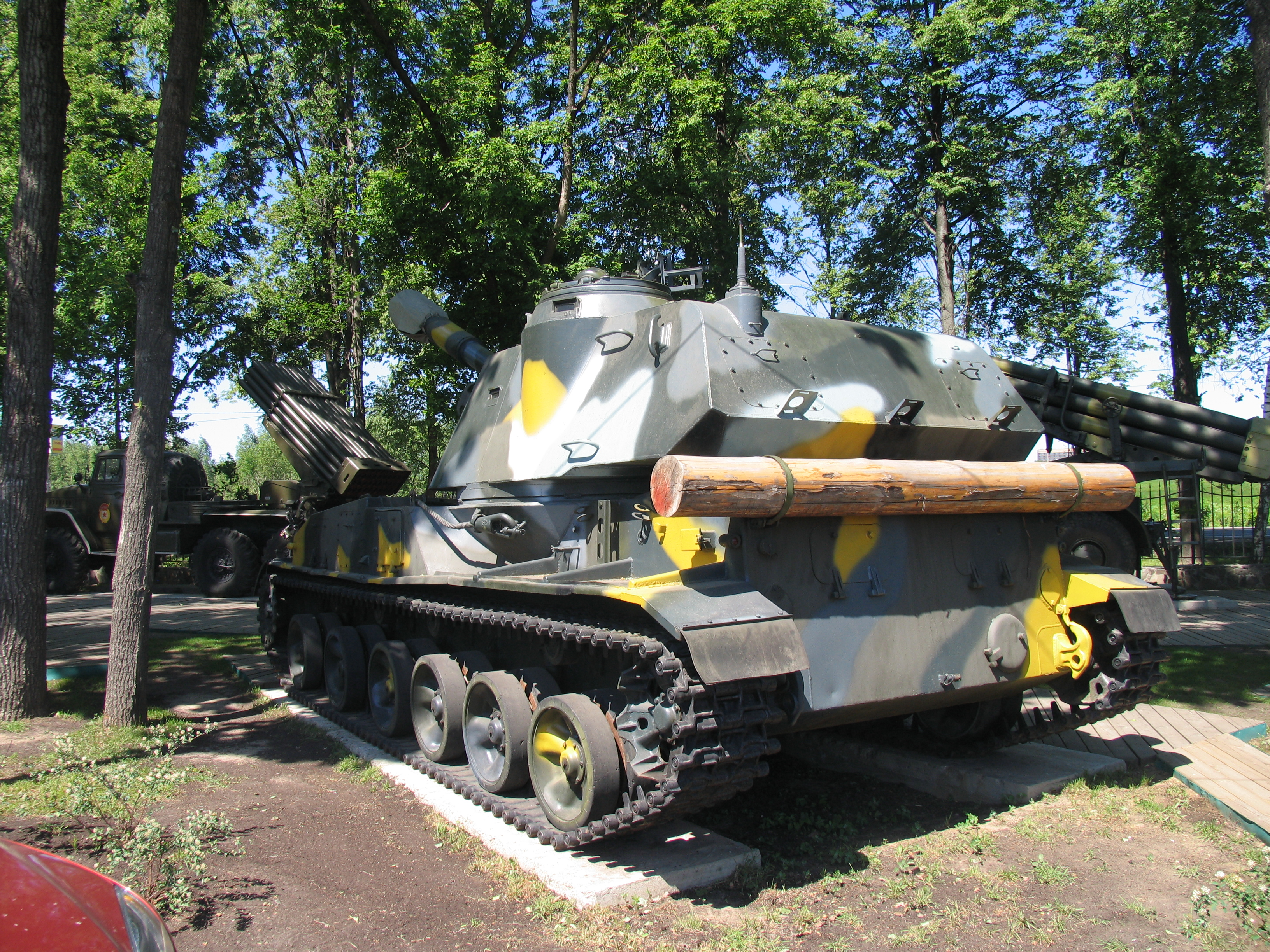 САУ 2С3 Акация в Музее техники Задорожного. Вид сзади-сбоку.